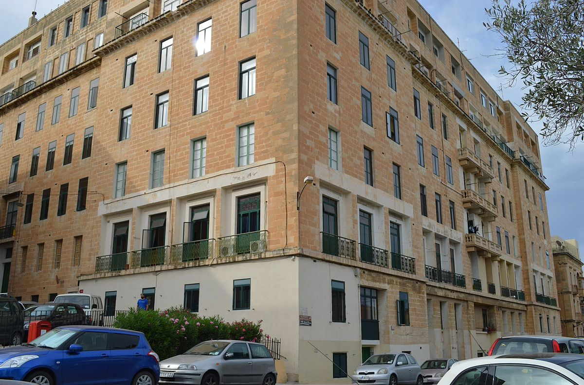 Blok mieszkalny, Valletta, Malta